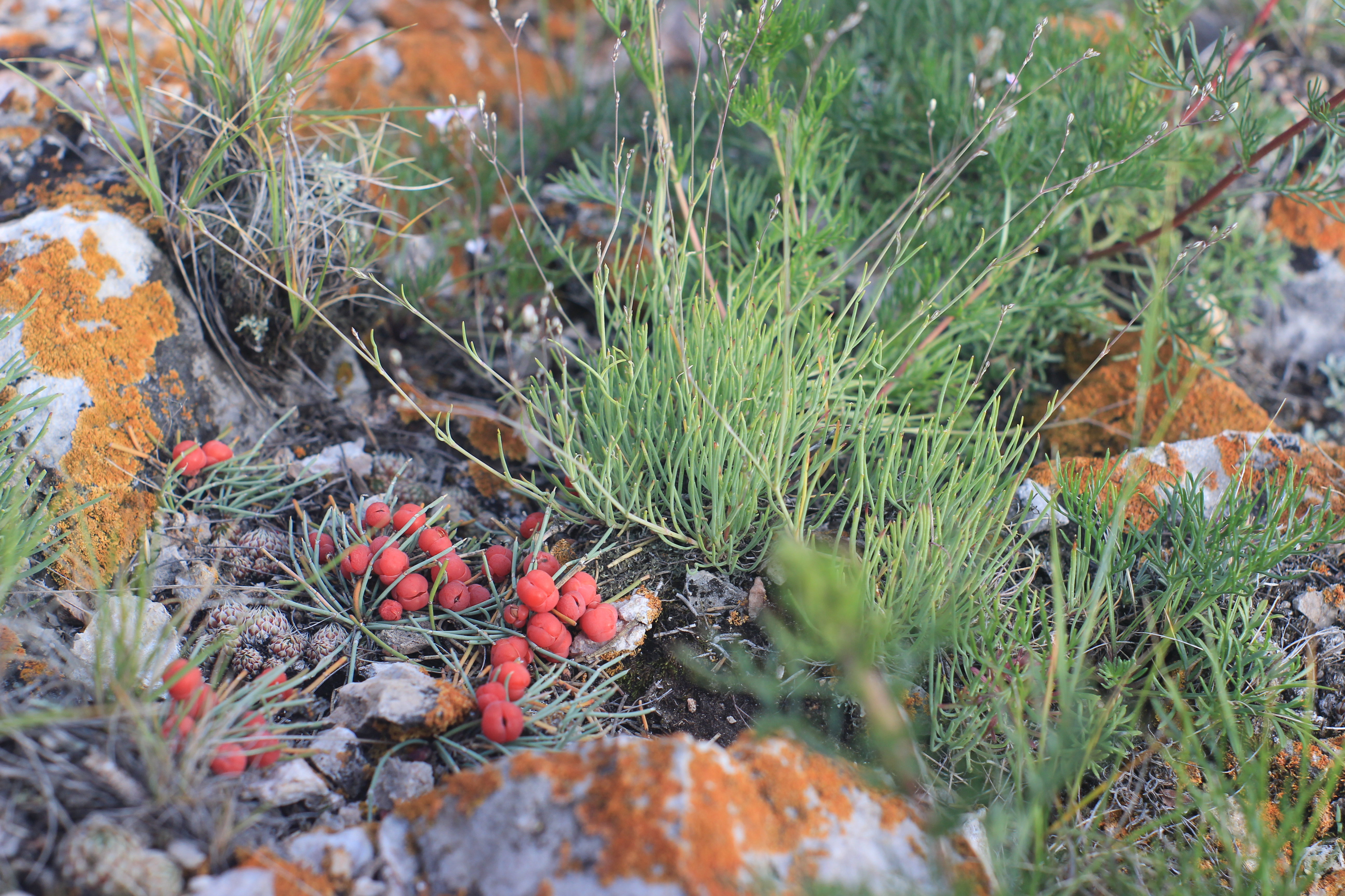 Базаихский разрез: Березовский район, Красноярский край Небольшие плодоносящие кустарники Хвойника односемянного (Ephedra monosperma) на каменистых склонах Торгашинского хребта, район скалы Рыжая, Базаихский разрез. This image is related to the protected area of Russia number 2410028